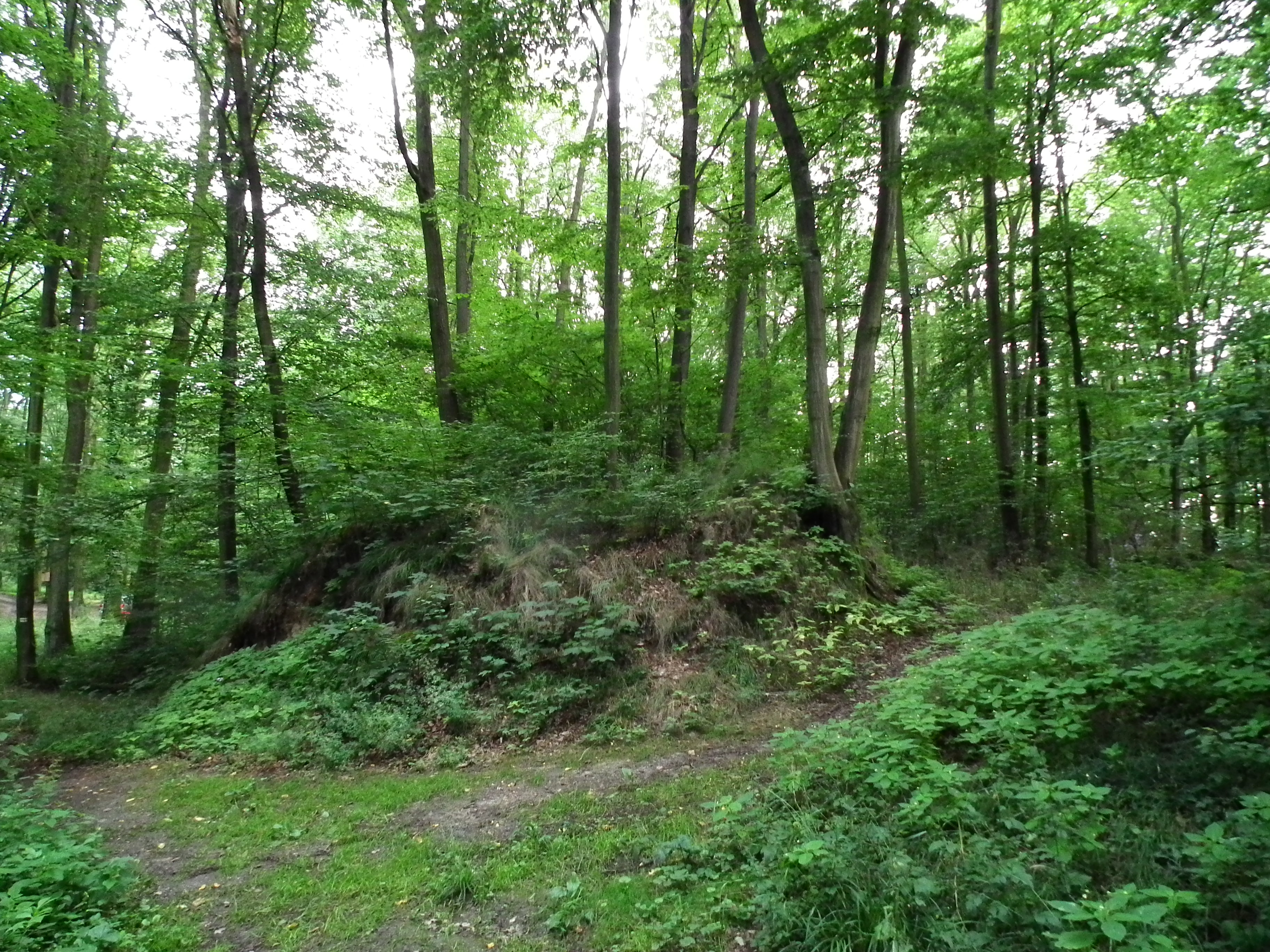 Dolina Tatarska pod Gilowem.